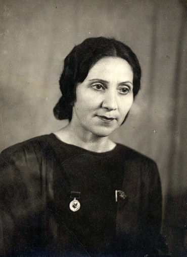 Marziyya Davudova